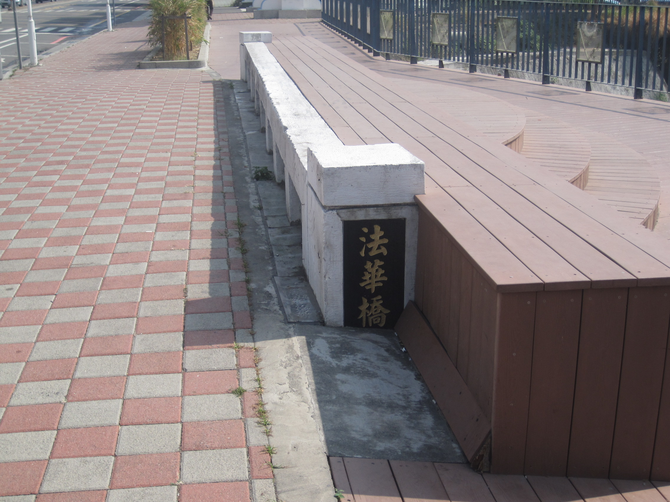 法華橋，竹溪的橋樑之一，現只剩半邊橋柱